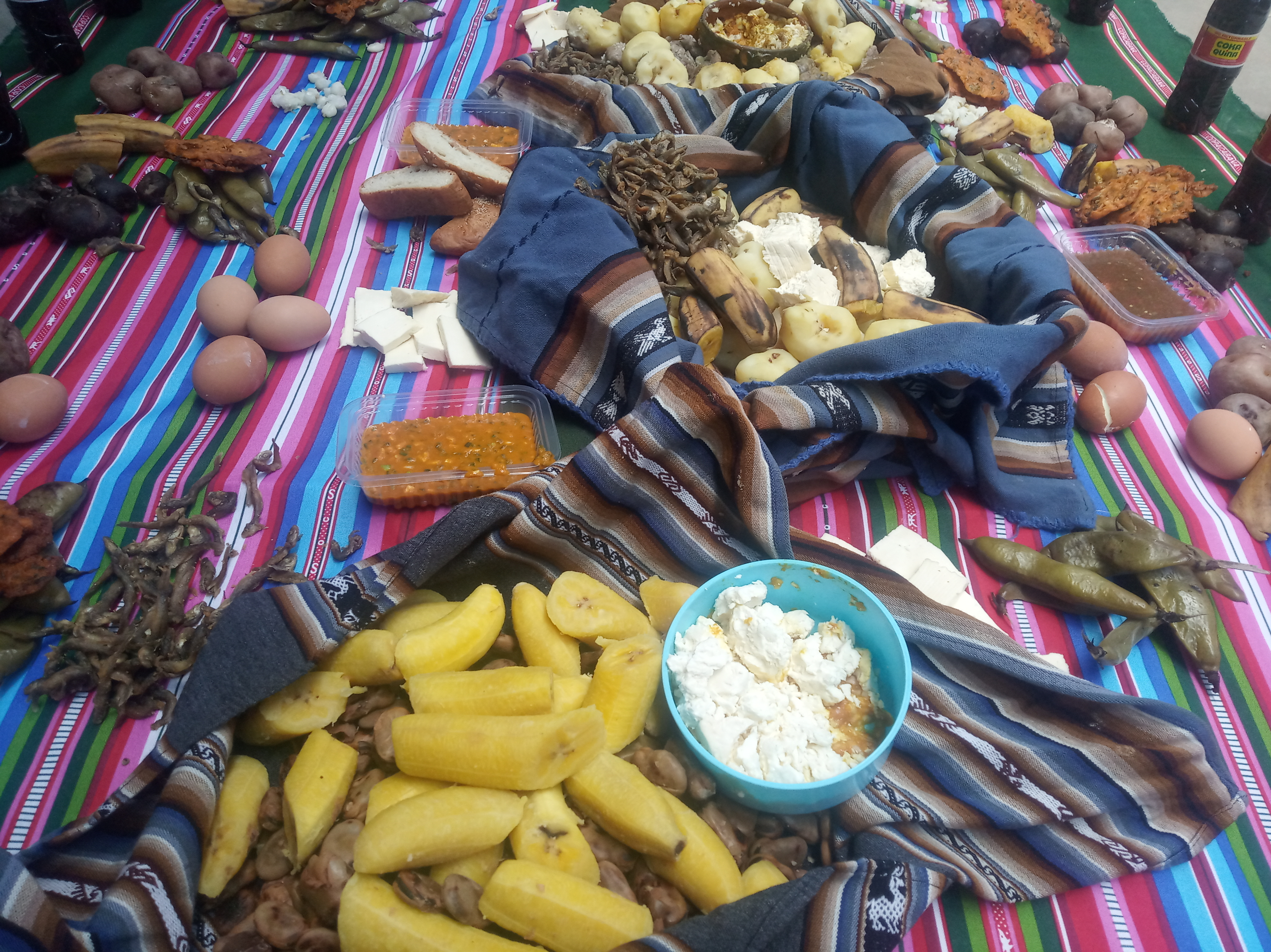 Aphtapi en área urbana el día del alimentación